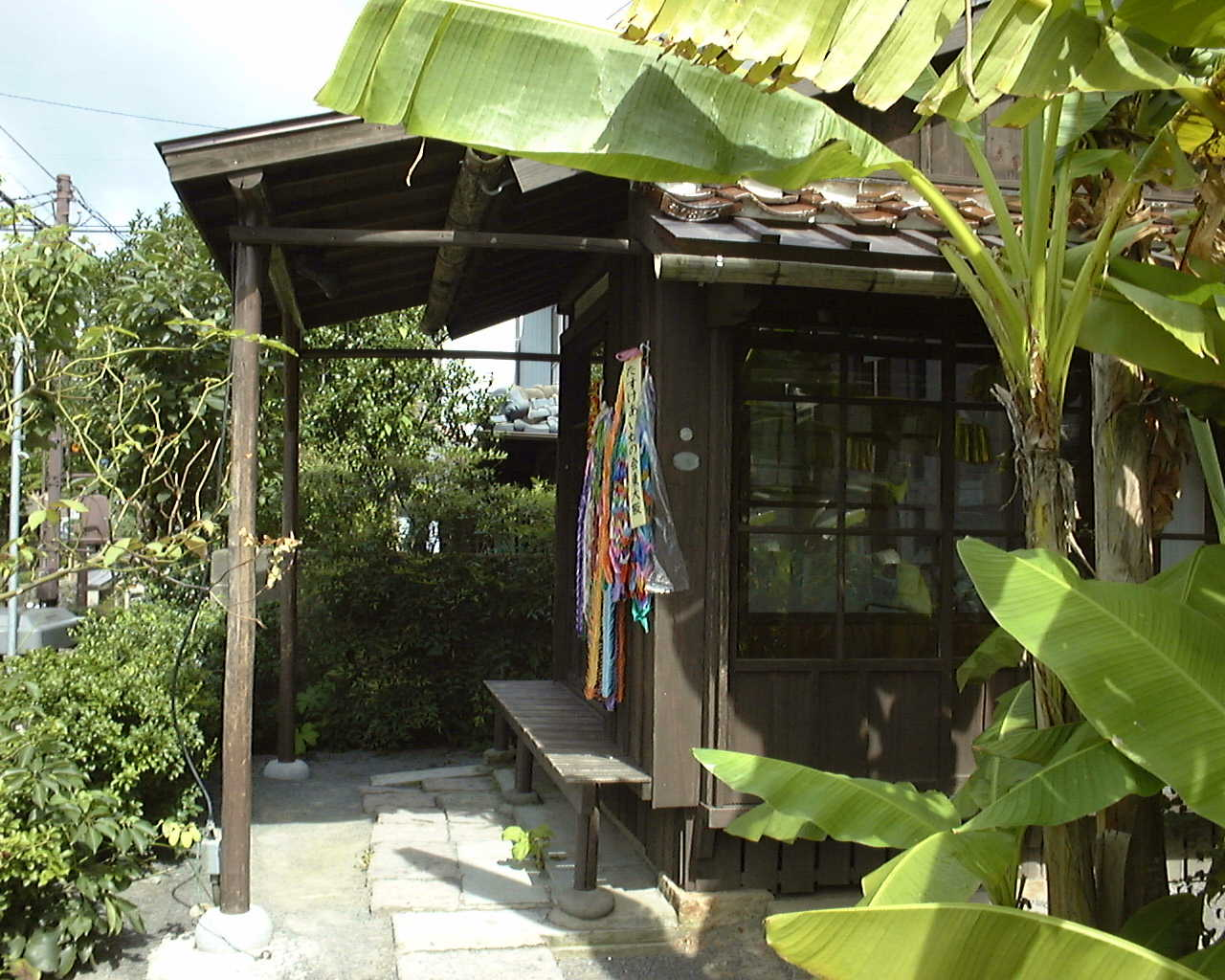 Nyokodo-cabin,Nagasaki-City,Nagasaki-pref,Japan.Aug,1998.